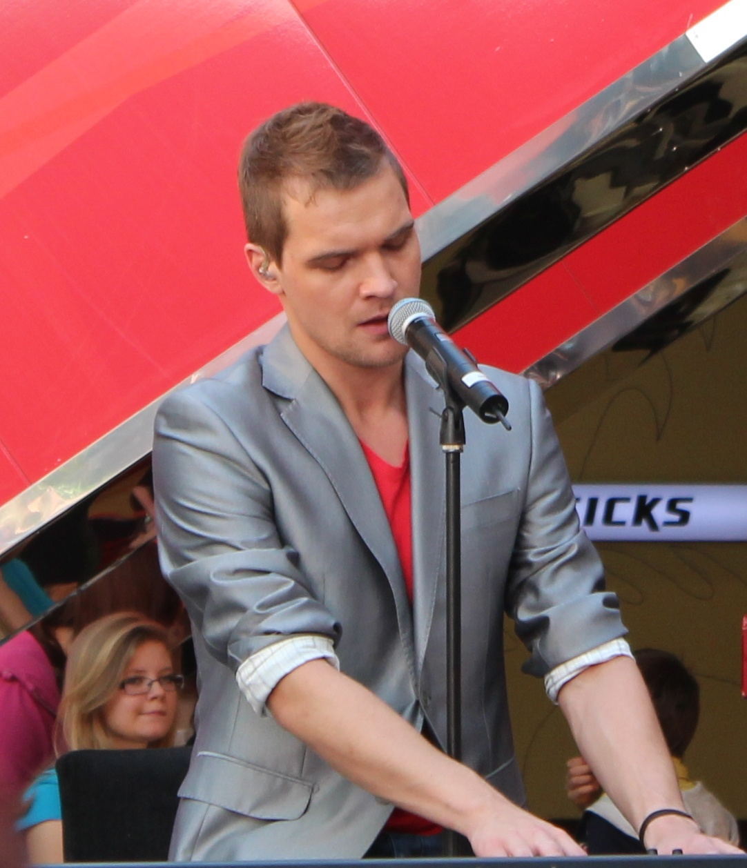 Ott Lepland oma viimasel kontserdil enne ärasõitu Eurovisioni lauluvõistlusele 13. mail 2012 Kristiine keskuse aatriumis